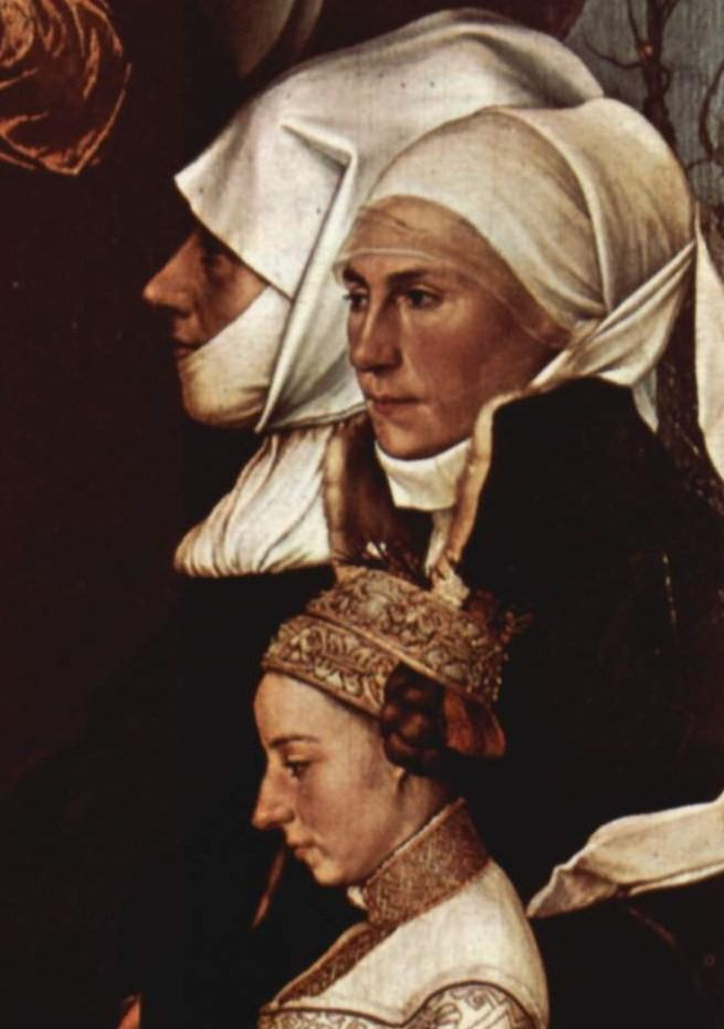 Detail der Madonna des Basler Bürgermeisters Jakob Meyer zum Hasen («Darmstädter Madonna») mit Stifterporträts, dem Auftraggeber: Jakob Meyer zum Hasen, Darstellung mit seinem Sohn (links) und auf der rechten Seite, in Profilansicht, mit weißer Haube und Kinnband: Jakobs erste (verstorbene) Ehefrau Magdalena Meyer zum Hasen geborene Bär († 1511), daneben im Halbprofil Dorothea Meyer zum Hasen geborene Kannengiesser, seit 1513 die zweite Ehefrau Jakob Meyer zum Hasens, und unten im Vordergrund deren 1513 geborene Tochter Anna Meyer zum Hasen